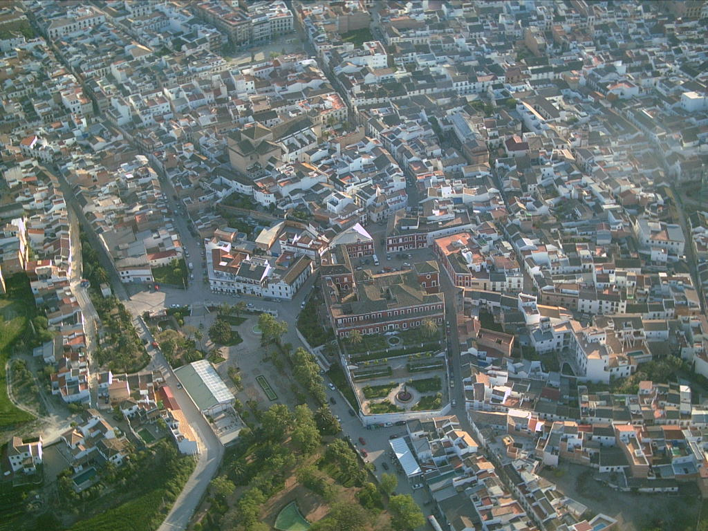 Vista aérea de Fernán Núñez (Córdoba)